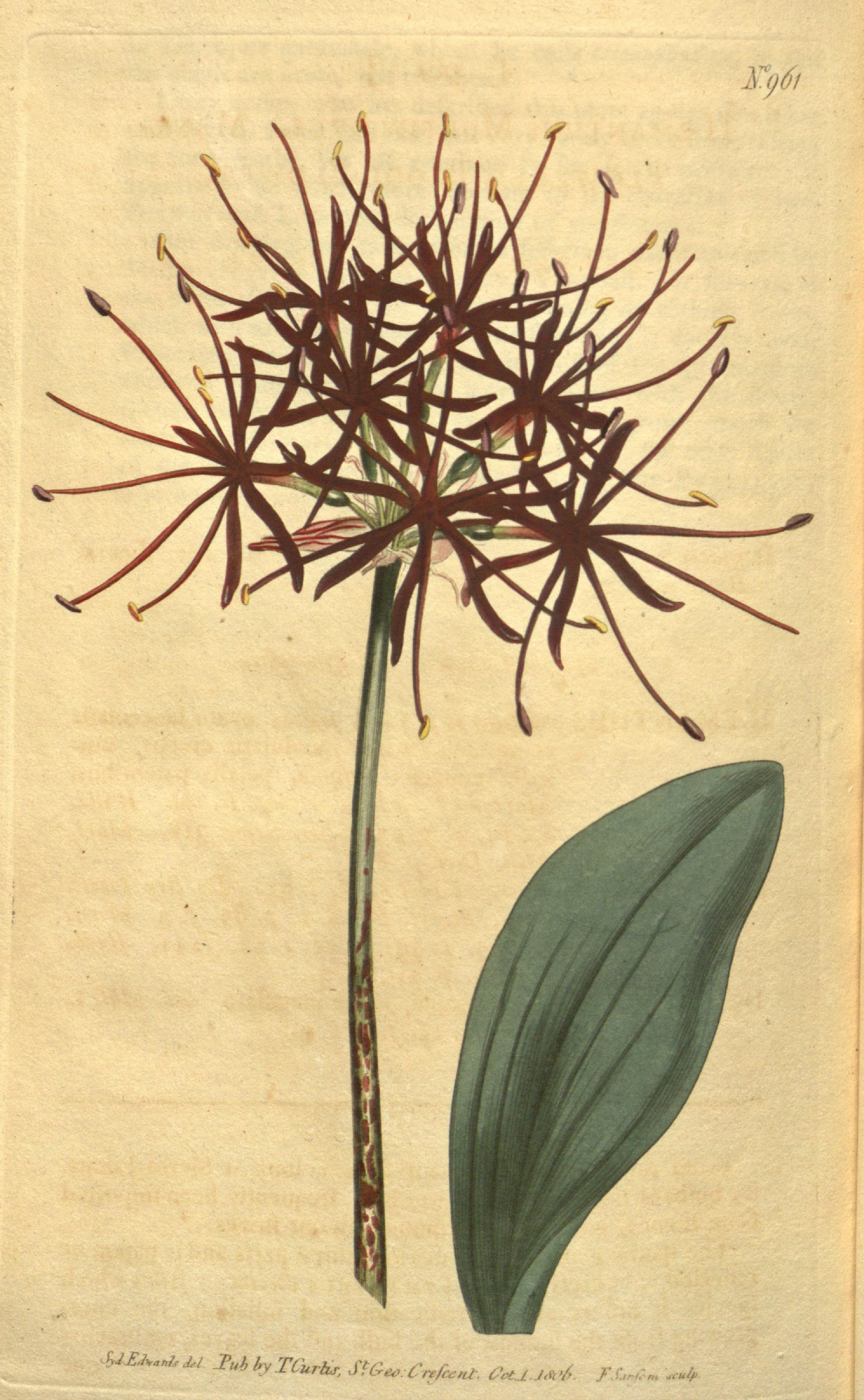 &£*** Jd VuhhrCur^S.